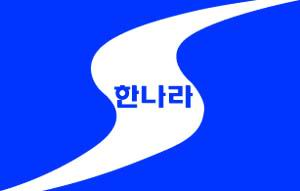 大國家黨初期標誌(1997~2004)